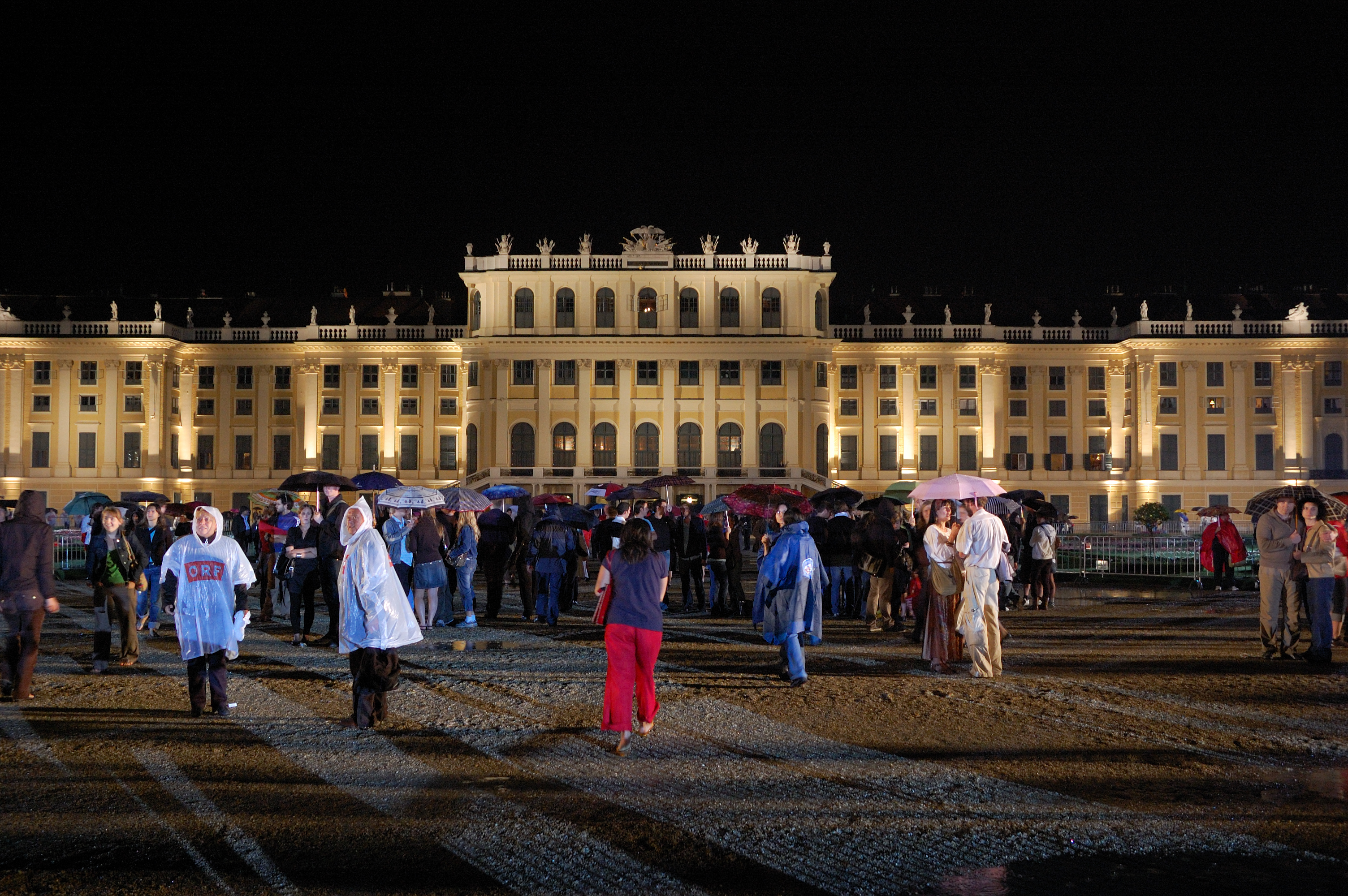 Sommernachtskonzert 2008